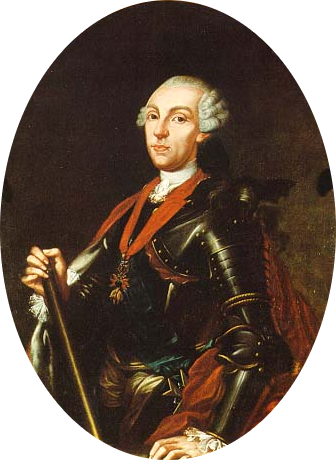 Philip, Duke of Parma (1720-1765), son of King Felipe V. of Spain and Elisabetta Farneselabel QS:Lit,"Ritratto di Don Filippo di Borbone, anonimo parmense XVIII°sec., collezione della Cassa di Risparmio di Busseto."